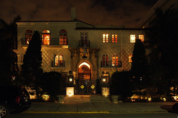 Casa Casuarina, 1116 Ocean Drive, 33139 Miami Beach illuminated at early night time